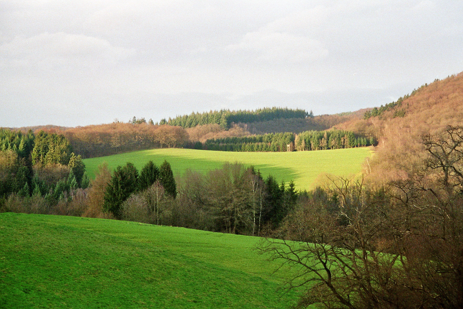 Near Schimmelshahn in Roßbach in Rhineland-Palatinate in the Westerwald.